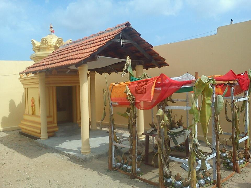 முருகன் சந்நிதி